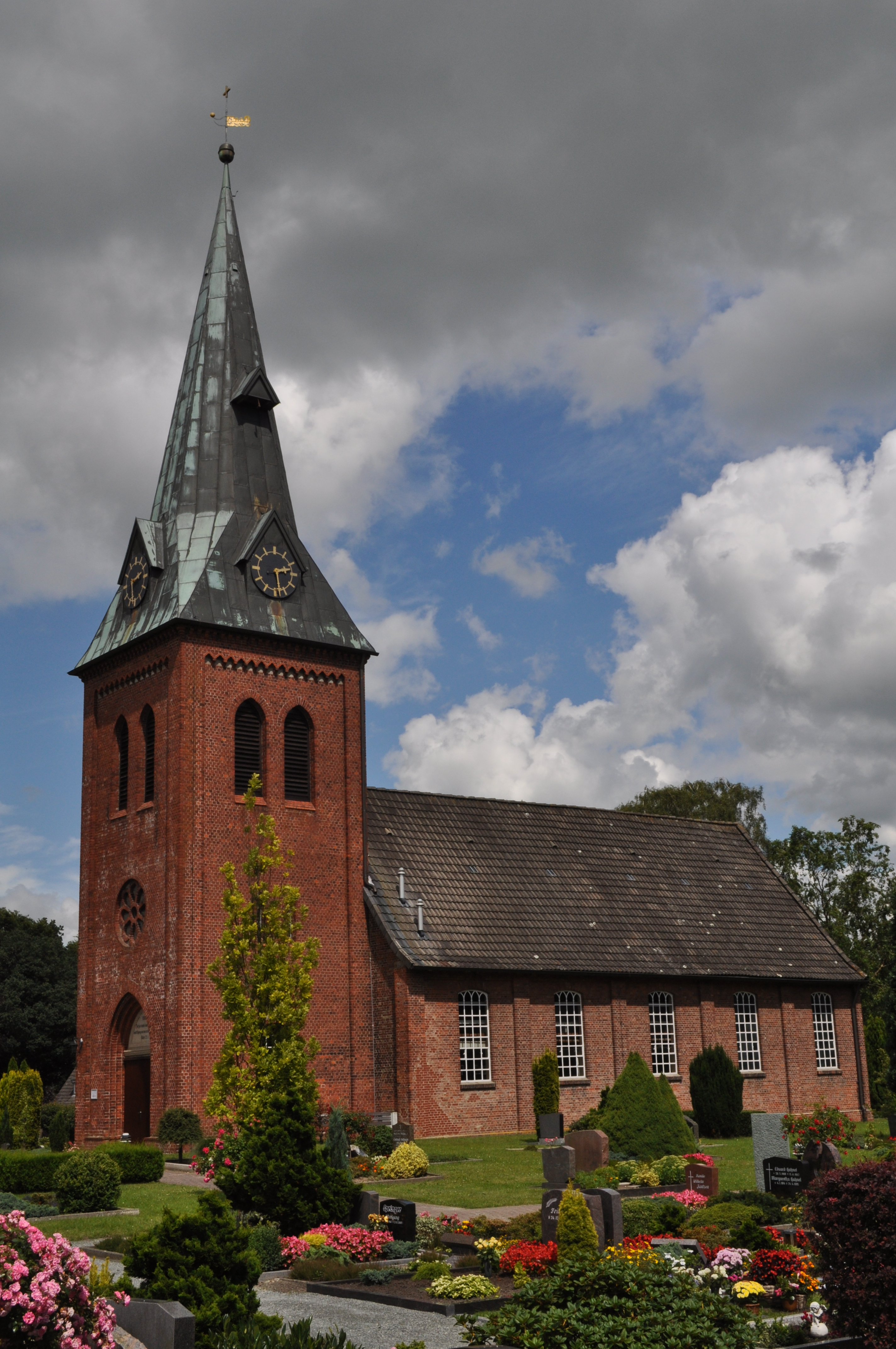 Kirche St. MIchaelis in Hemmoor-Basbeck, Blick von Südwesten. This is a photograph of an architectural monument.